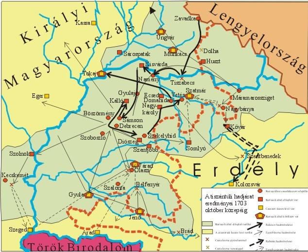 A Rákóczi-szabadságharc 1703-as tiszántúli hadjáratának hadműveleti térképe